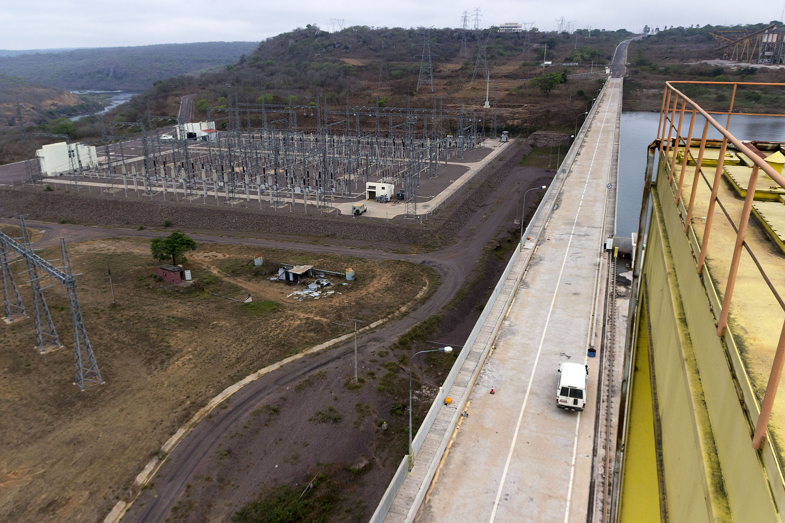 ГЭС Капанда. Вид плотины на площаку ОРУ 220.